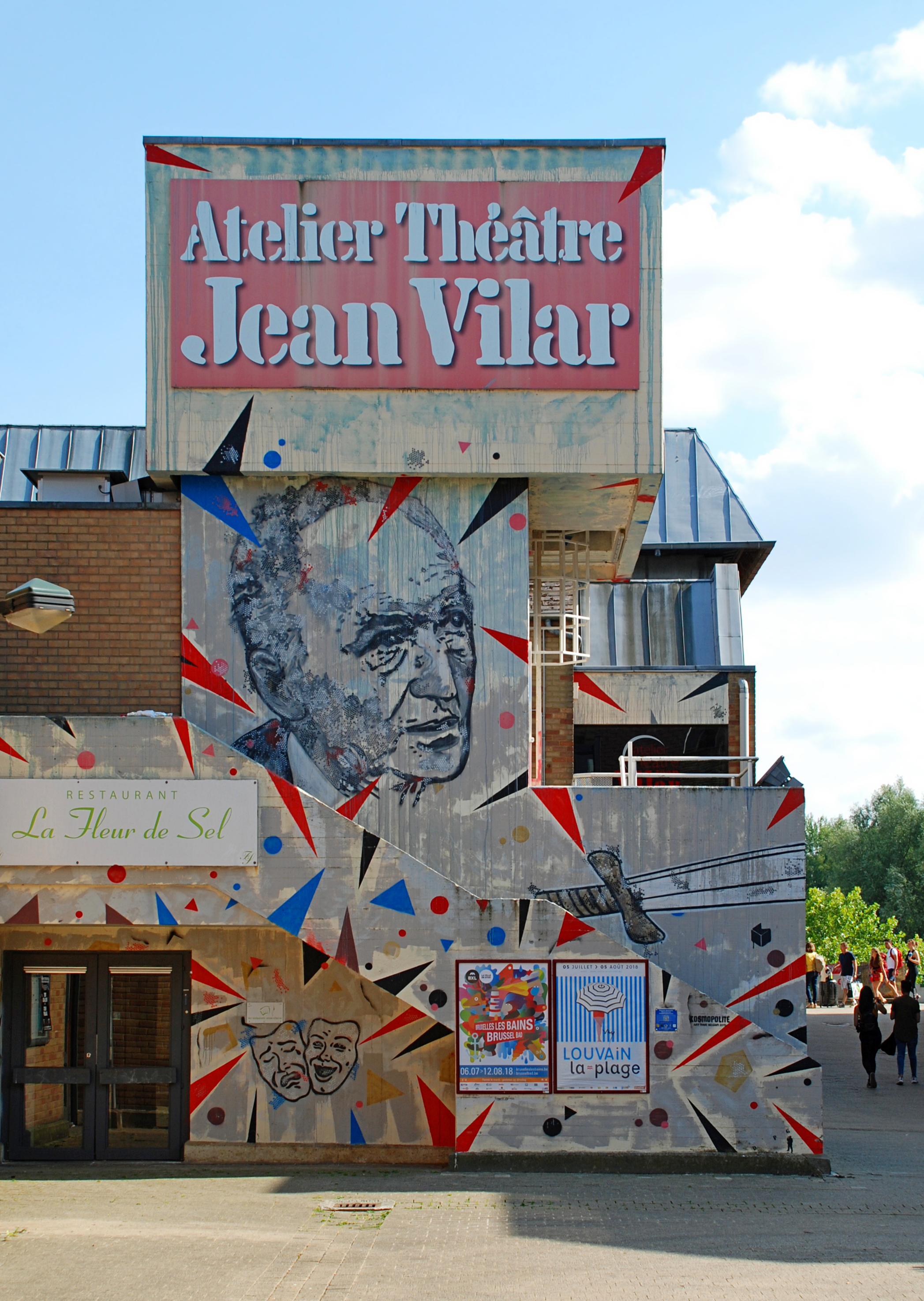 Belgique - Louvain-la-Neuve - Théâtre Jean Vilar (architecture brutaliste, architecte Jean Potvin, 1979 ; fresques du graffeur français Damien-Paul Gal, Kosmopolite Art Tour 2015)